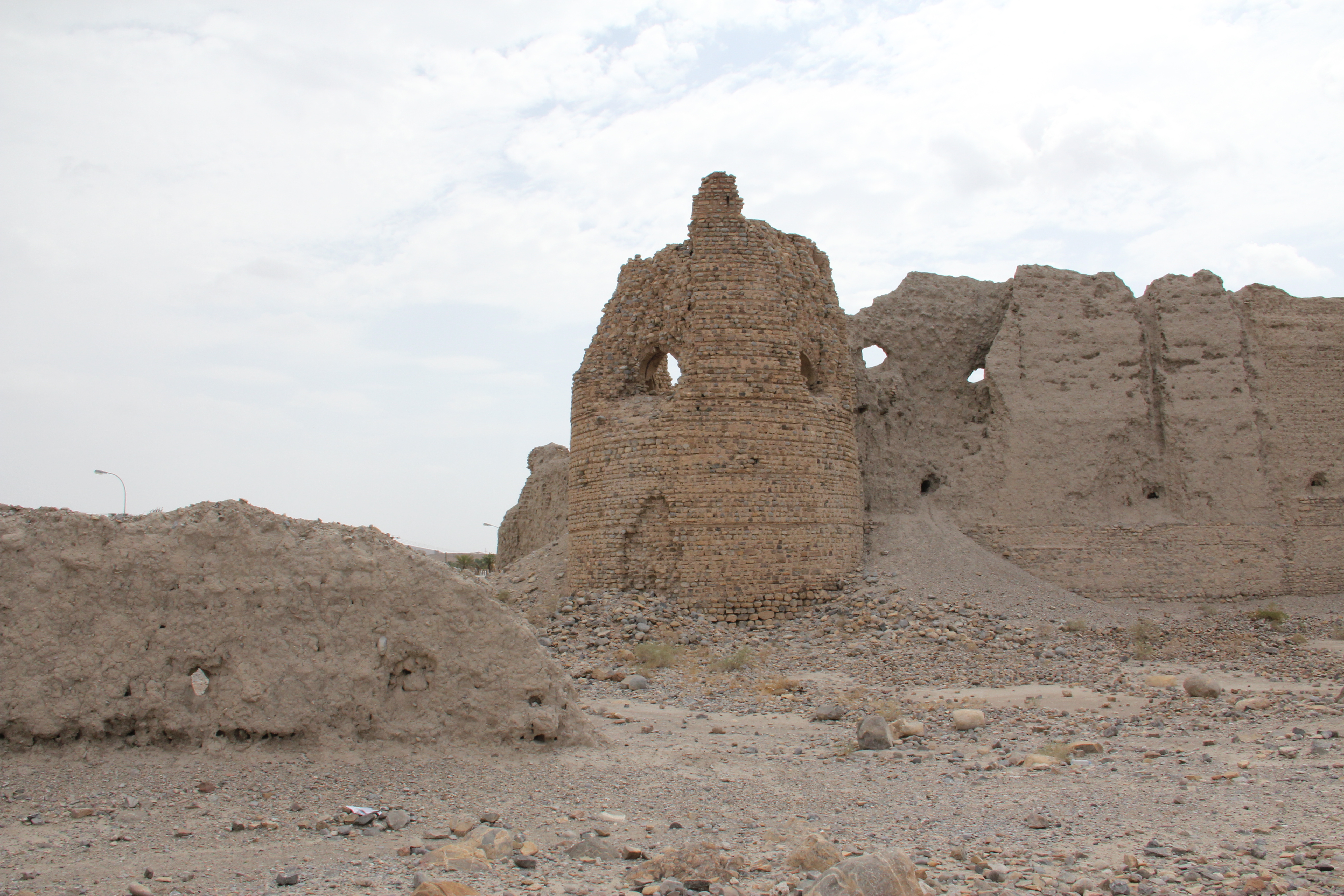 Alte Stadtteile Izki